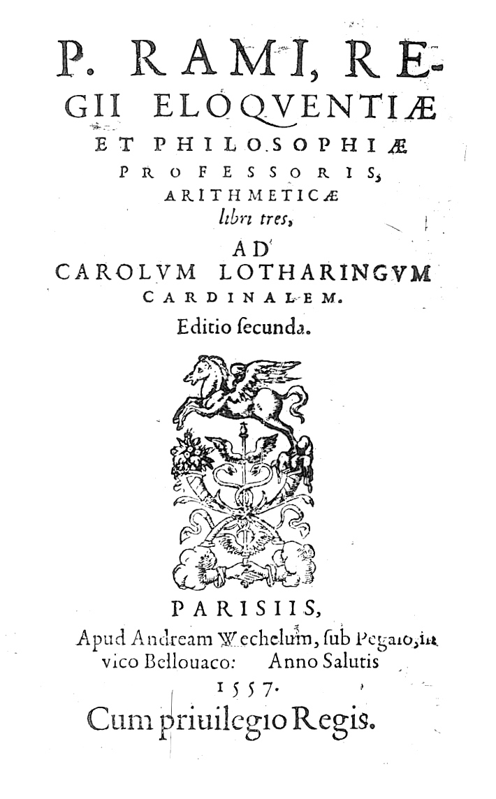 P. Rami, regii eloquentiae et philosophiae professoris, Arithmeticae libri tres, ad Carolum Lotharingum cardinalem. - Parisiis : apud Andream Wechelum, sub Pegaso, in vico Bellouaco, 1557. - [16], 140, [4] p. ; 8º .